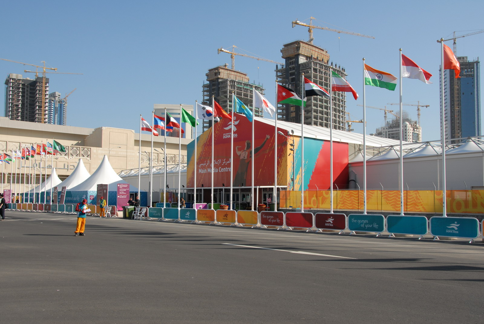 2006年亞洲運動會。